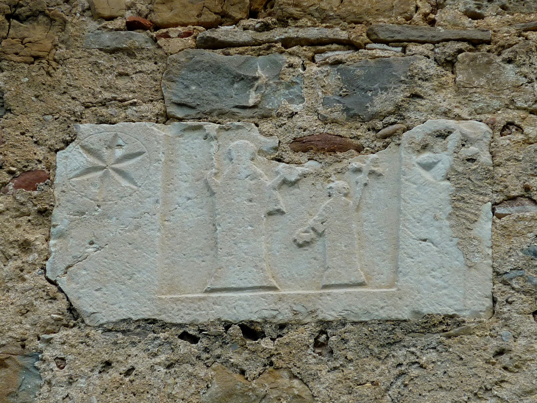 Església de Sant Iscle i Santa Victòria de Llinars (Castellar del Riu): làpida sepulcral usada per fer la paret del temple